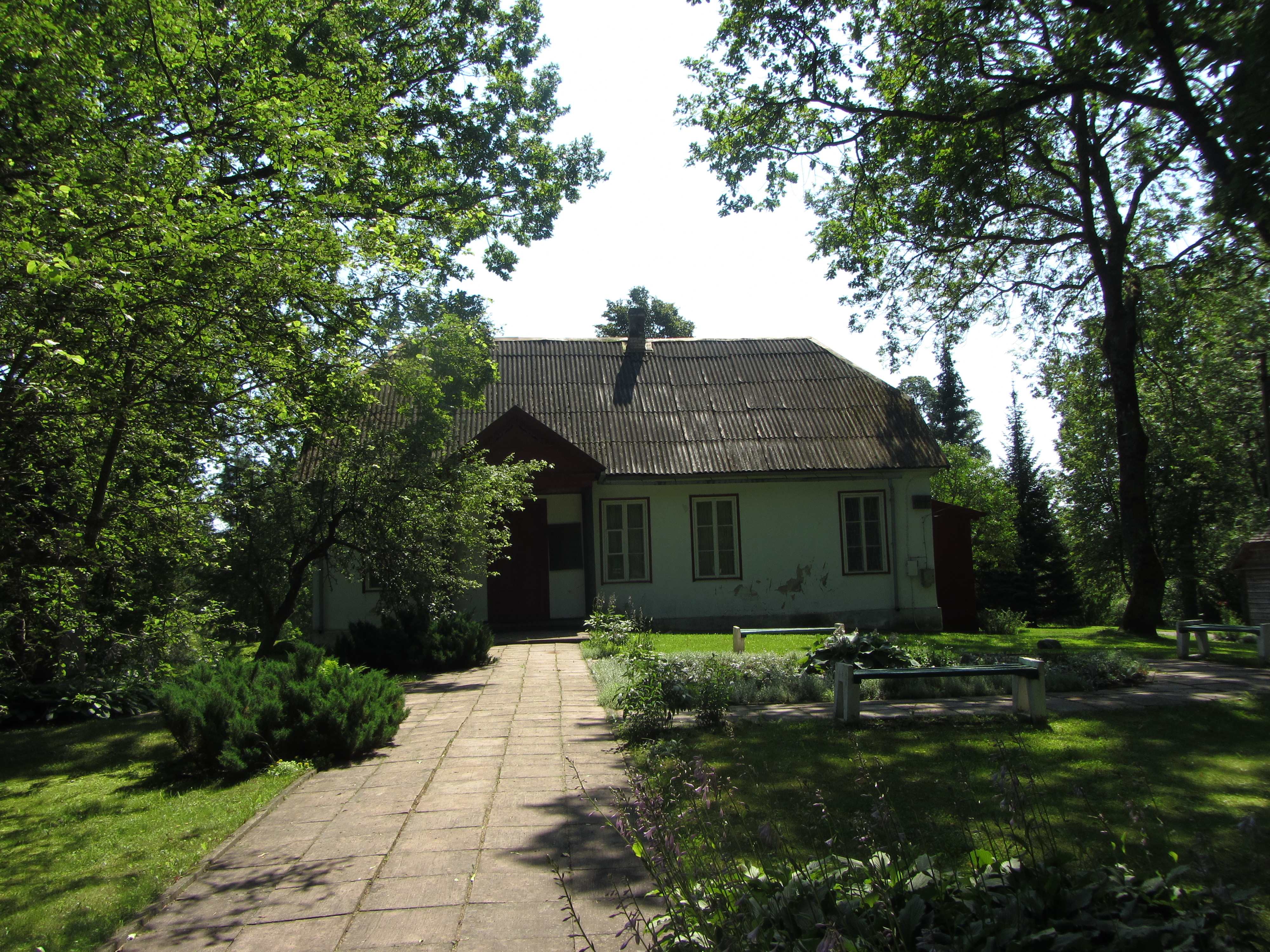 Rojus 30265, Lithuania